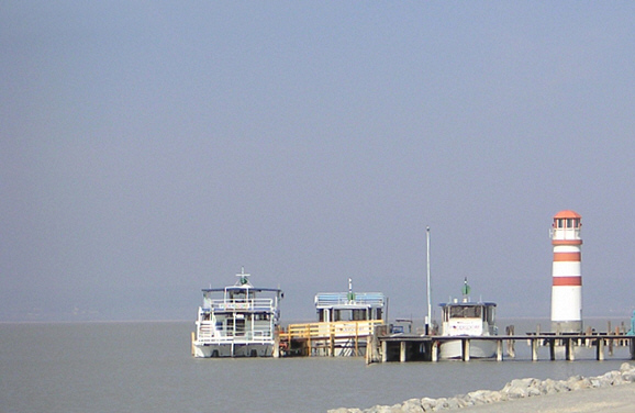 Leuchtturm bei Podersdorf am Neusiedlersee, Photographiert im April 2005 von Binter, zur völlig freien Verfügung